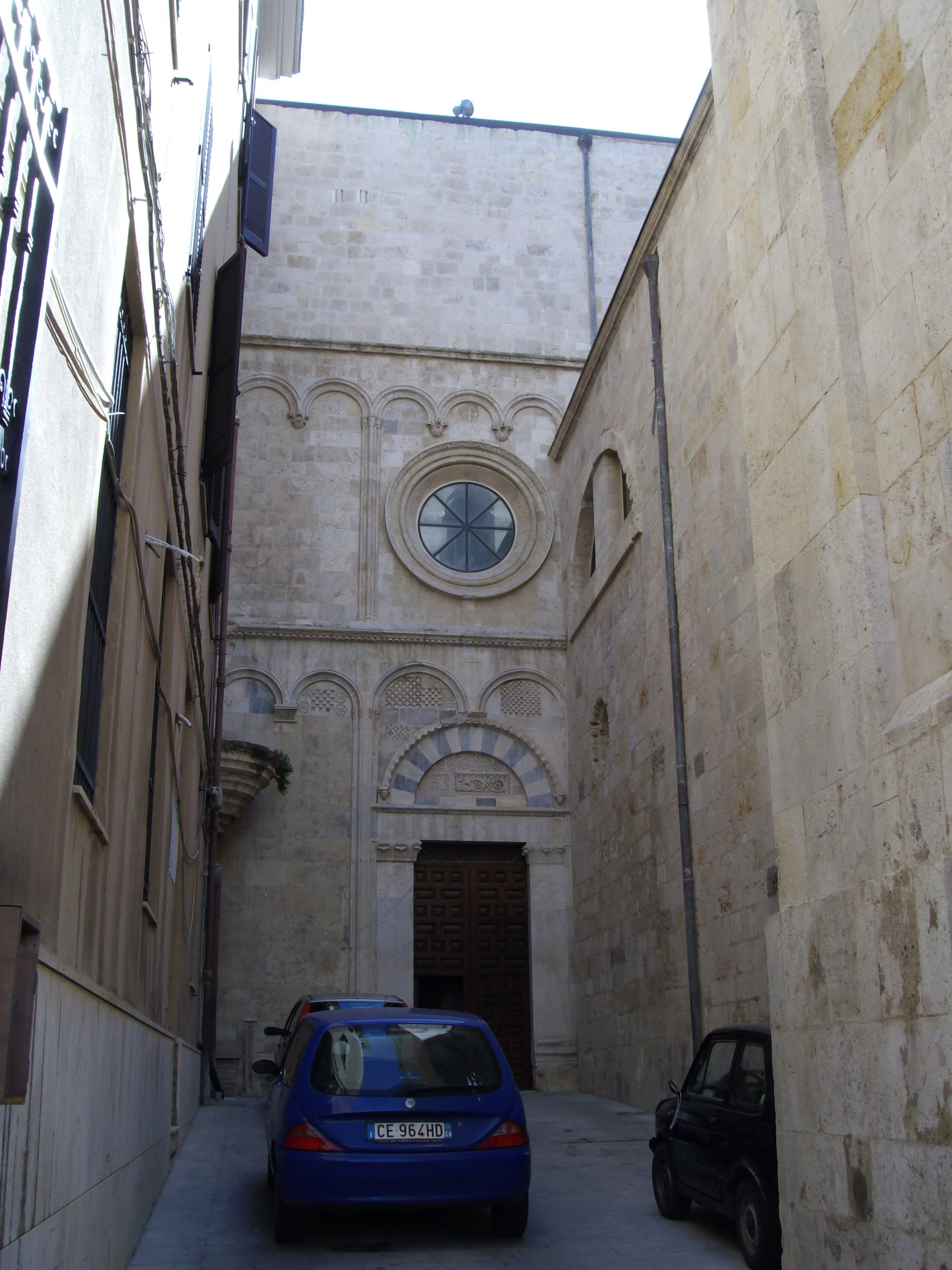 Transetto della Cattedrale di Cagliari